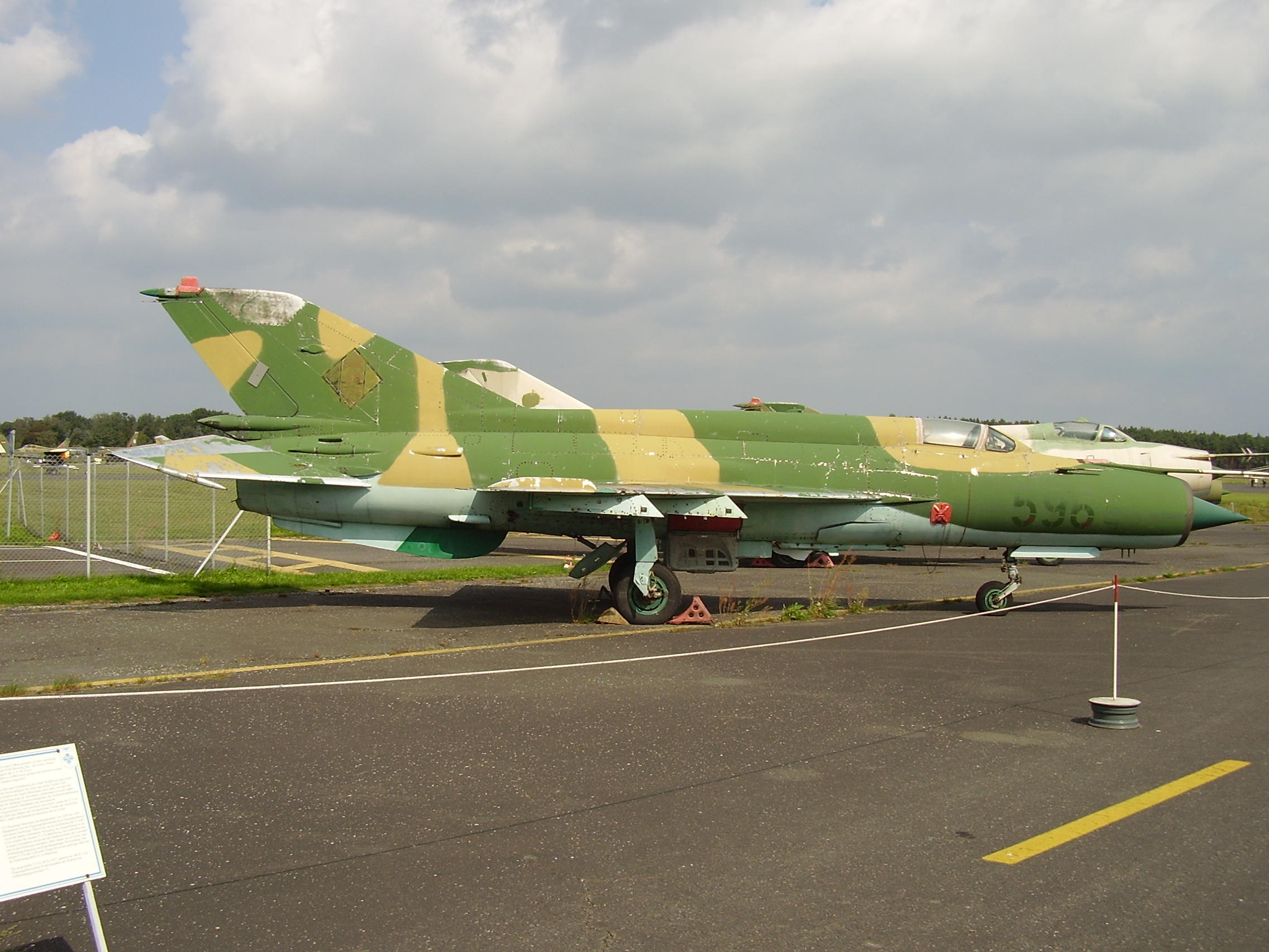 Luftwaffenmuseum der Bundeswehr; Airforce Museum of the Bundeswehr; Berlin-Gatow, MiG-21M